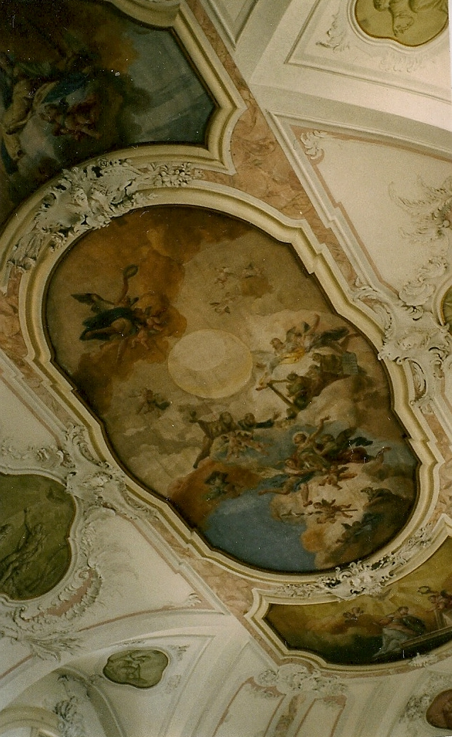 Fresques du plafond de la nef de l'église d'Istrana (Vénétie), par Francesco Zugno (1709-1787).